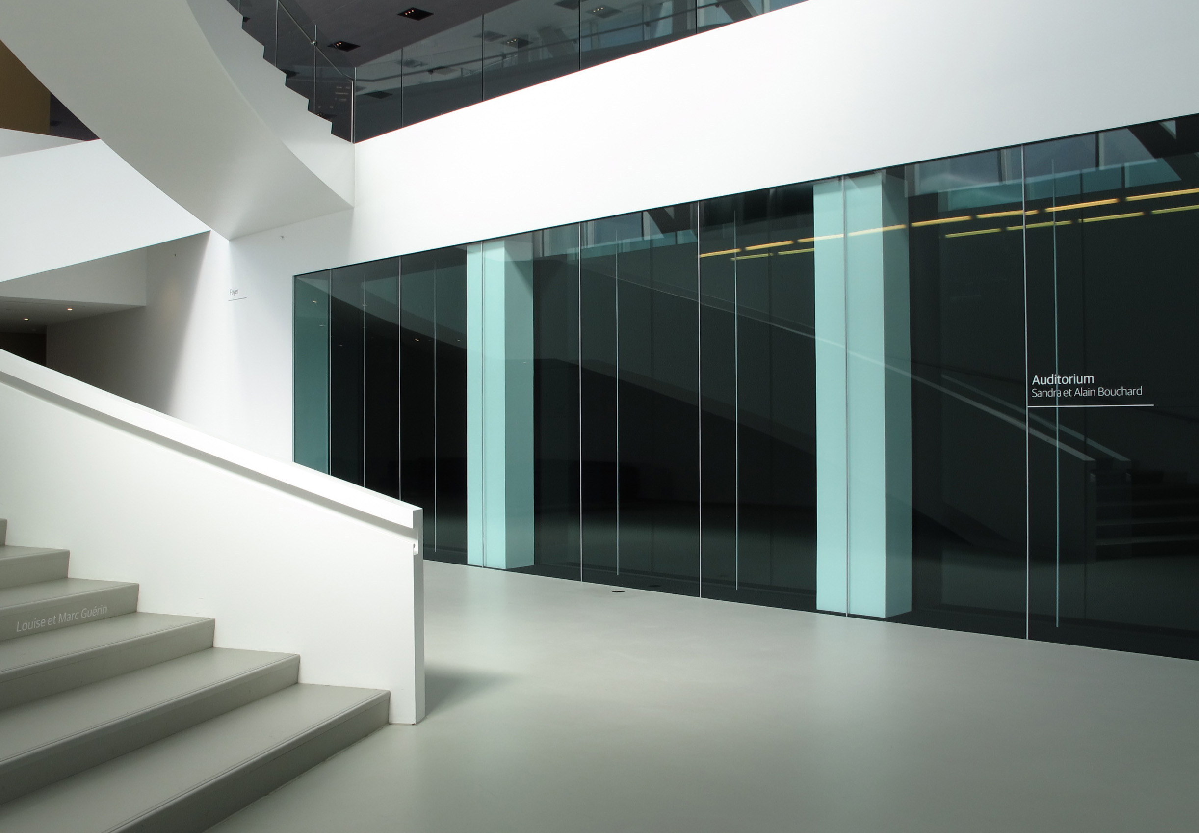 Musée national des beaux-arts du Québec, pavillon Pierre-Lassonde, Auditorium Sandra et Alain Bouchard, Québec.